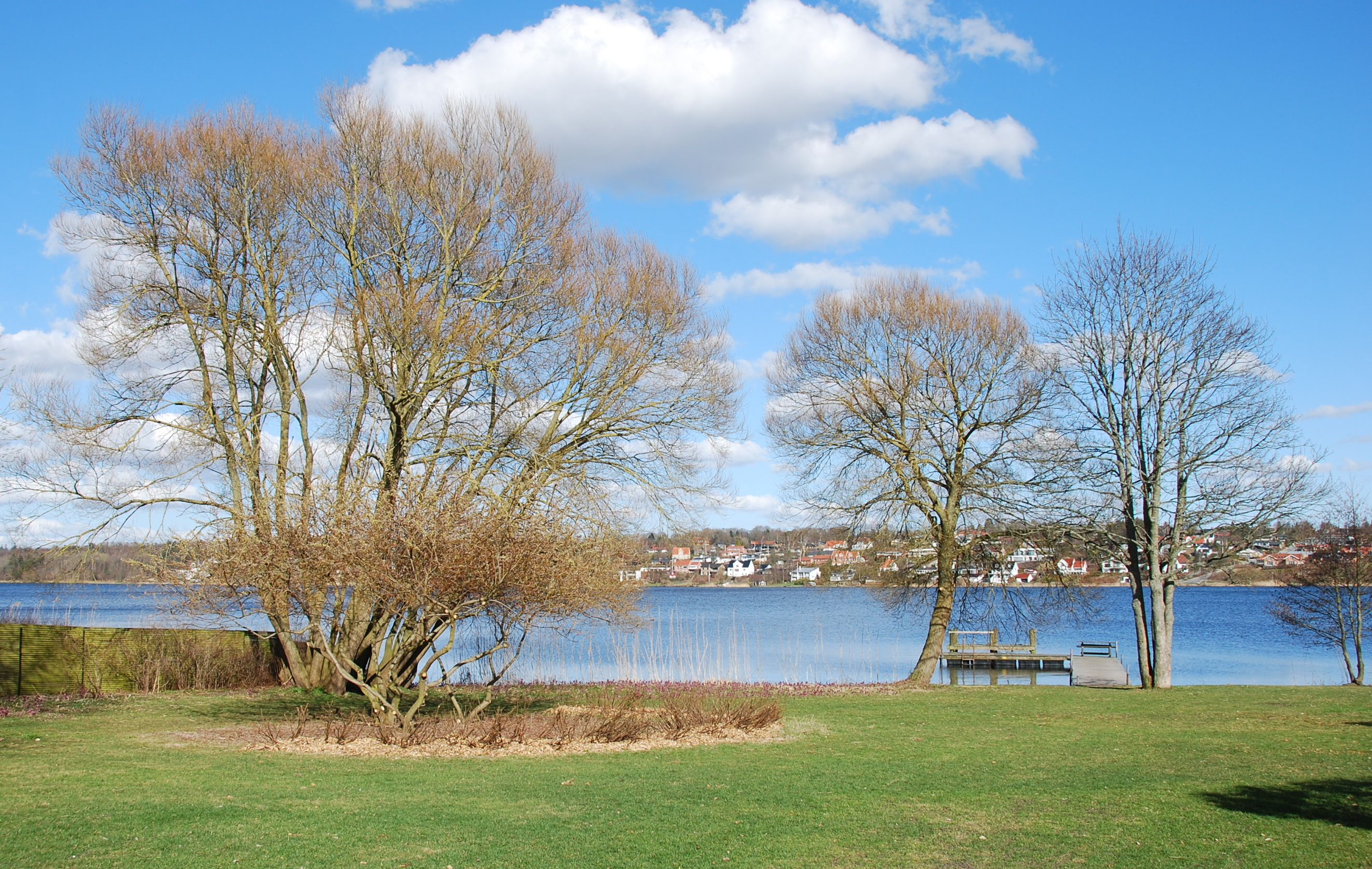 Pilehaven i Viborg, beliggende ned til Nørresø.